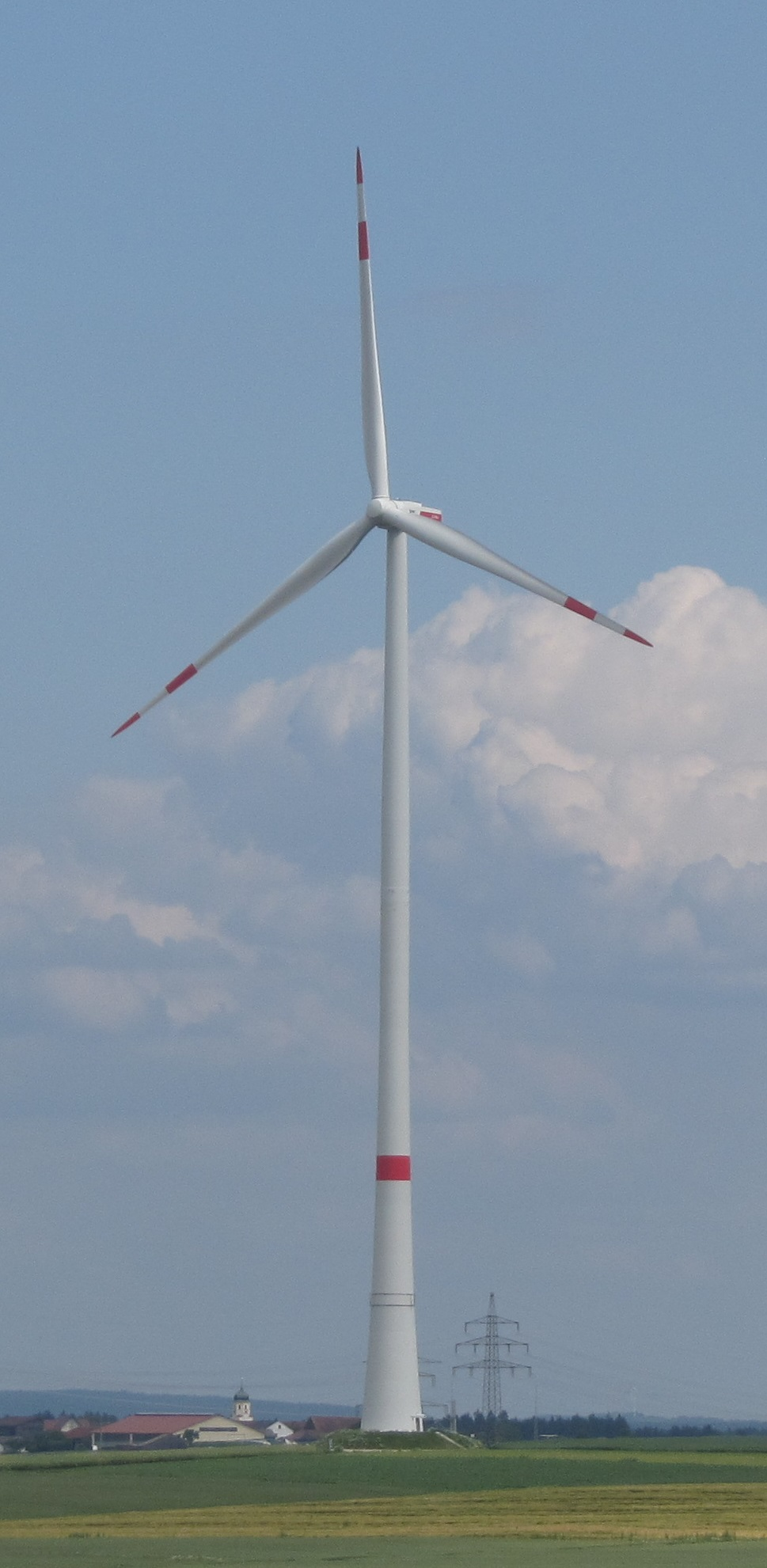 Windpark Berching, REpower 3.2M114